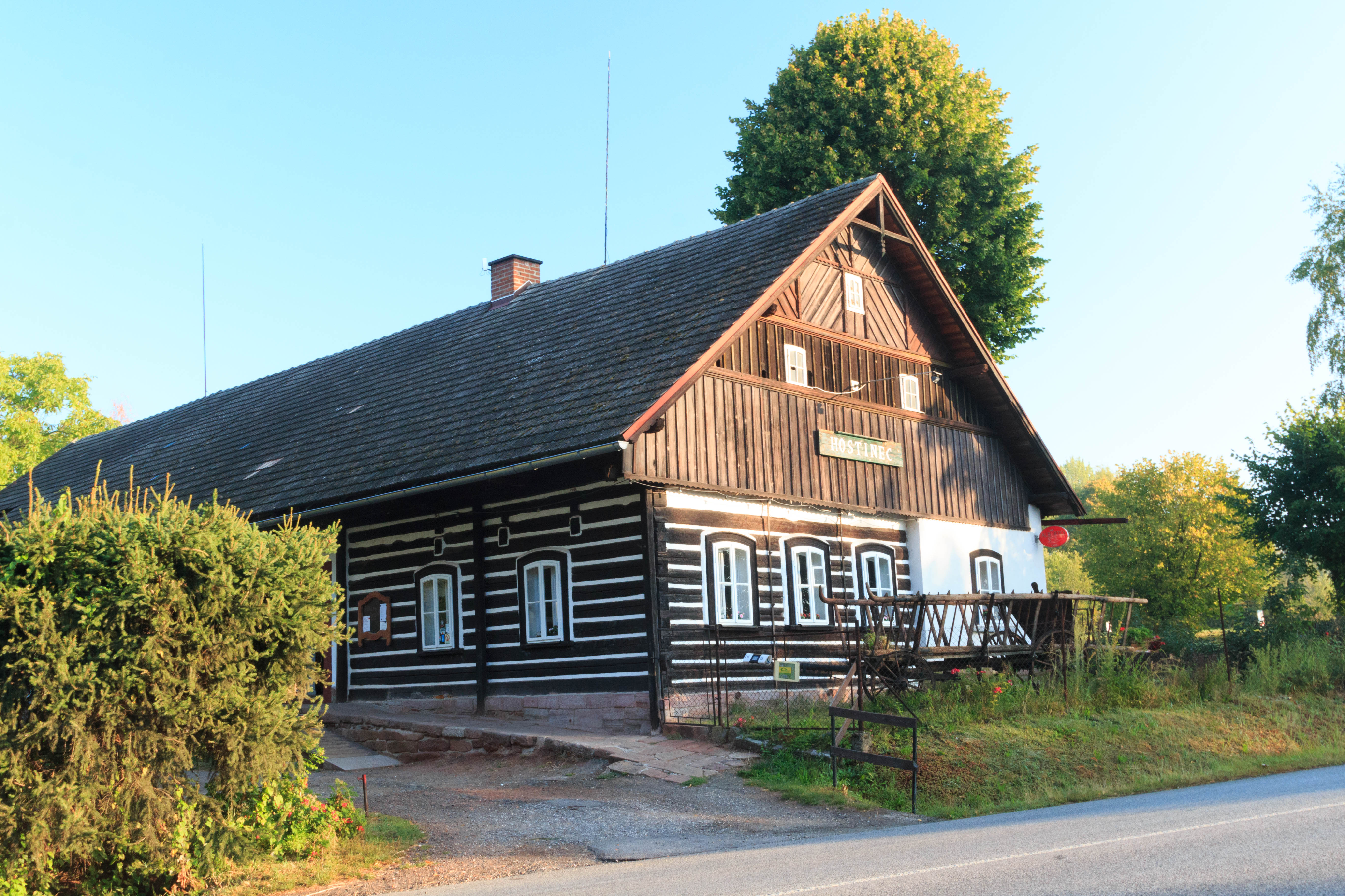 Hostinec Na Ploužnici